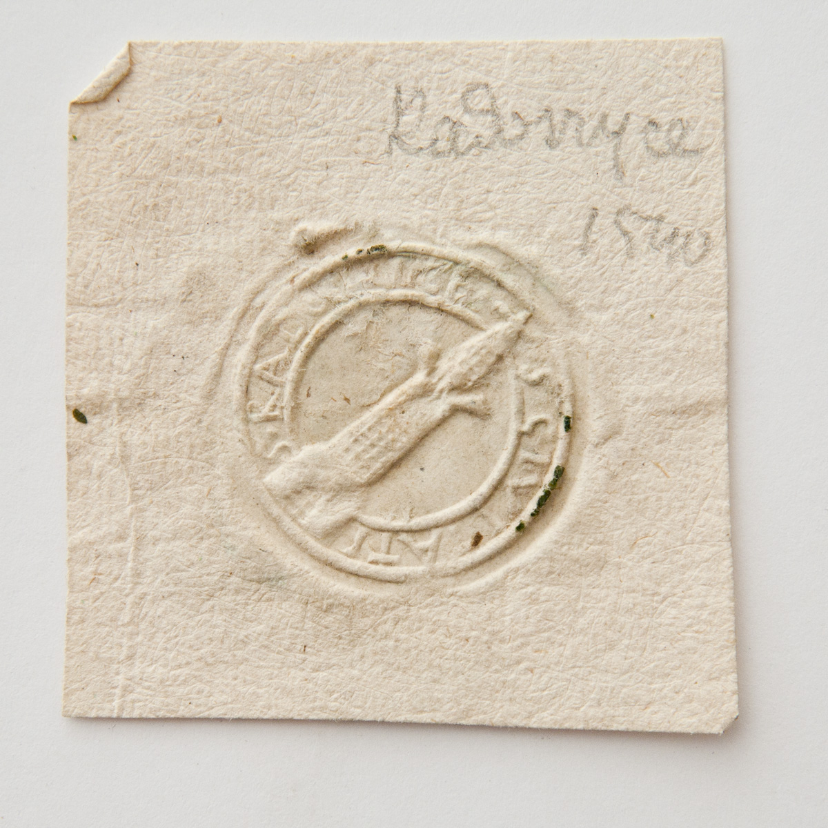 Pieczęć Radoszyc z 1540 roku